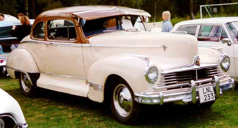 Hudson Commodore Six (Series 172) Club Coupé (1947)